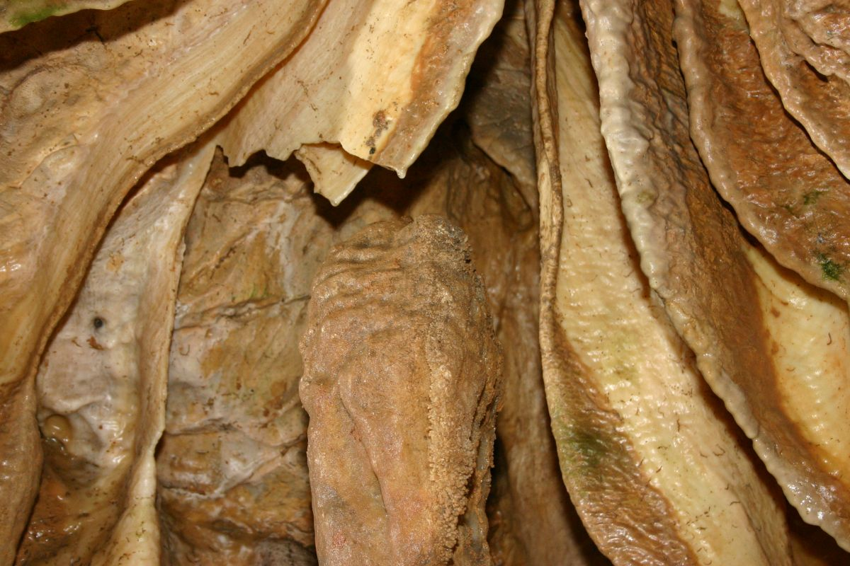 Binghöhle bei Streitberg